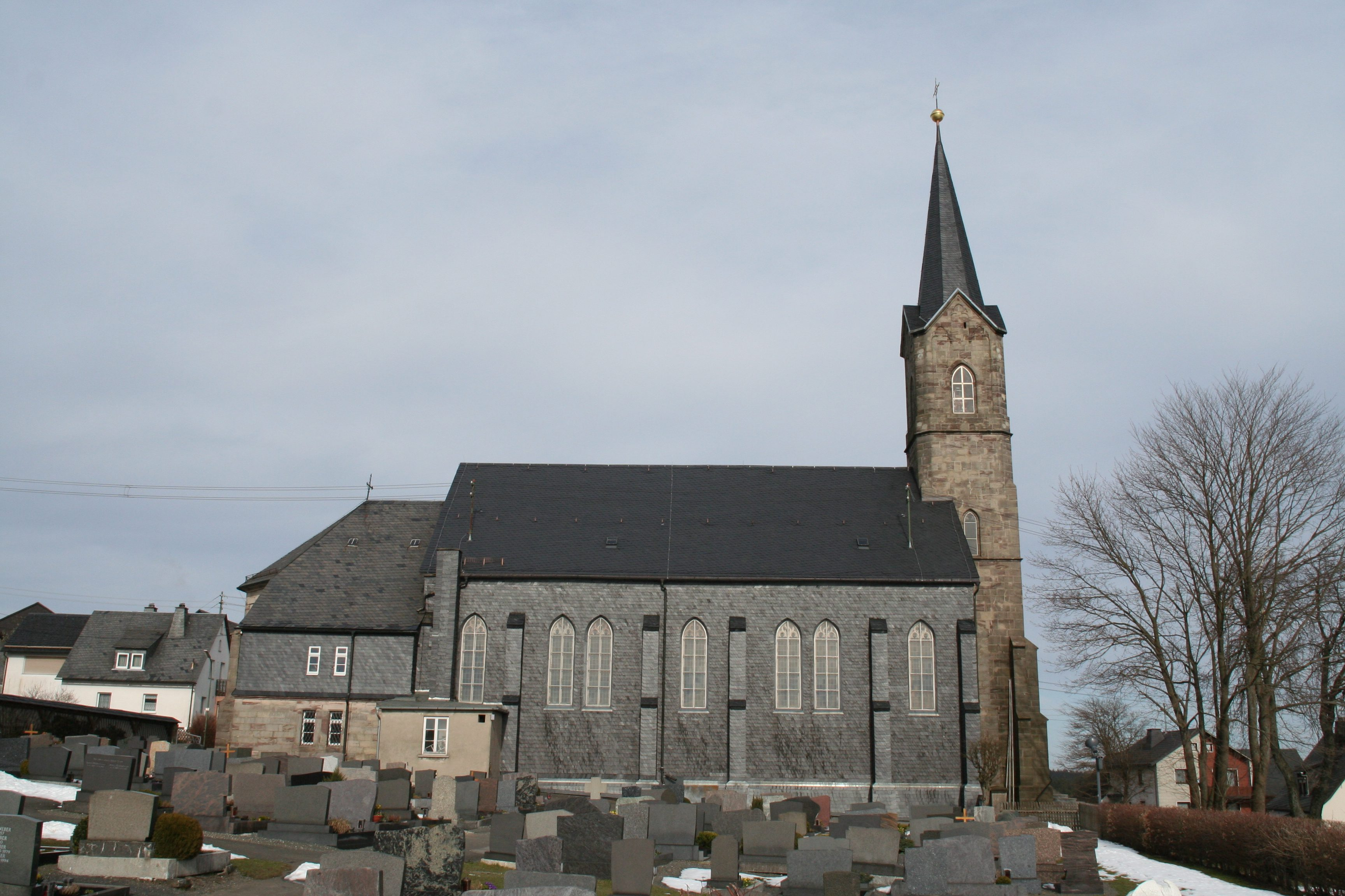 Tschirn im Landkreis Kronach, Katholische Kirche St. Jakobus